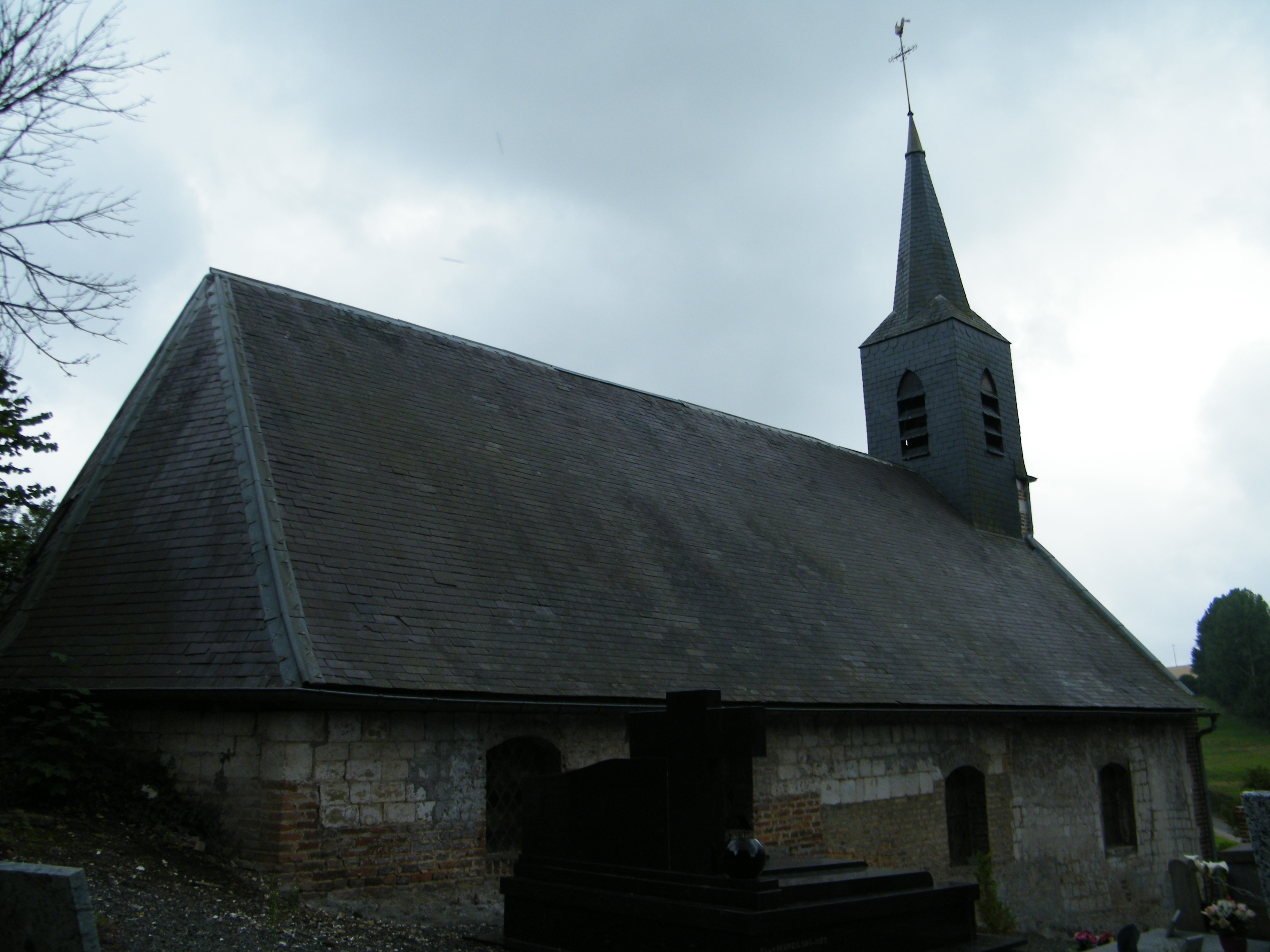 Vue de l'église.